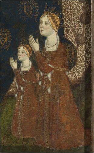 Detalle del cuadro de Jaume Serra titulado La Virgen de Tobed. La obra muestra a la Virgen María llevando en sus brazos al Niño Jesús, y a sus pies aparecen el rey Enrique II de Castilla y el infante Juan, que llegaría a reinar como Juan I de Castilla, y también la reina Juana Manuel de Villena junto a una de sus hijas, que tal vez sea Leonor o Juana.